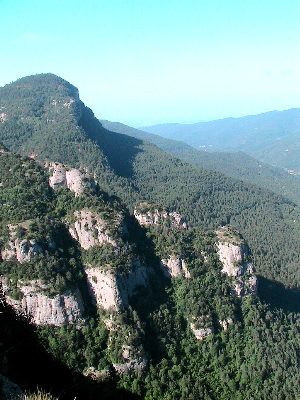 l'Arrodonit cim del Puig Redon al darrera dels cingles de Sant Mamet de les Fraus de Vilella. Des de les Muntanyes de Taravil. Capolat (Berguedà - Catalunya)